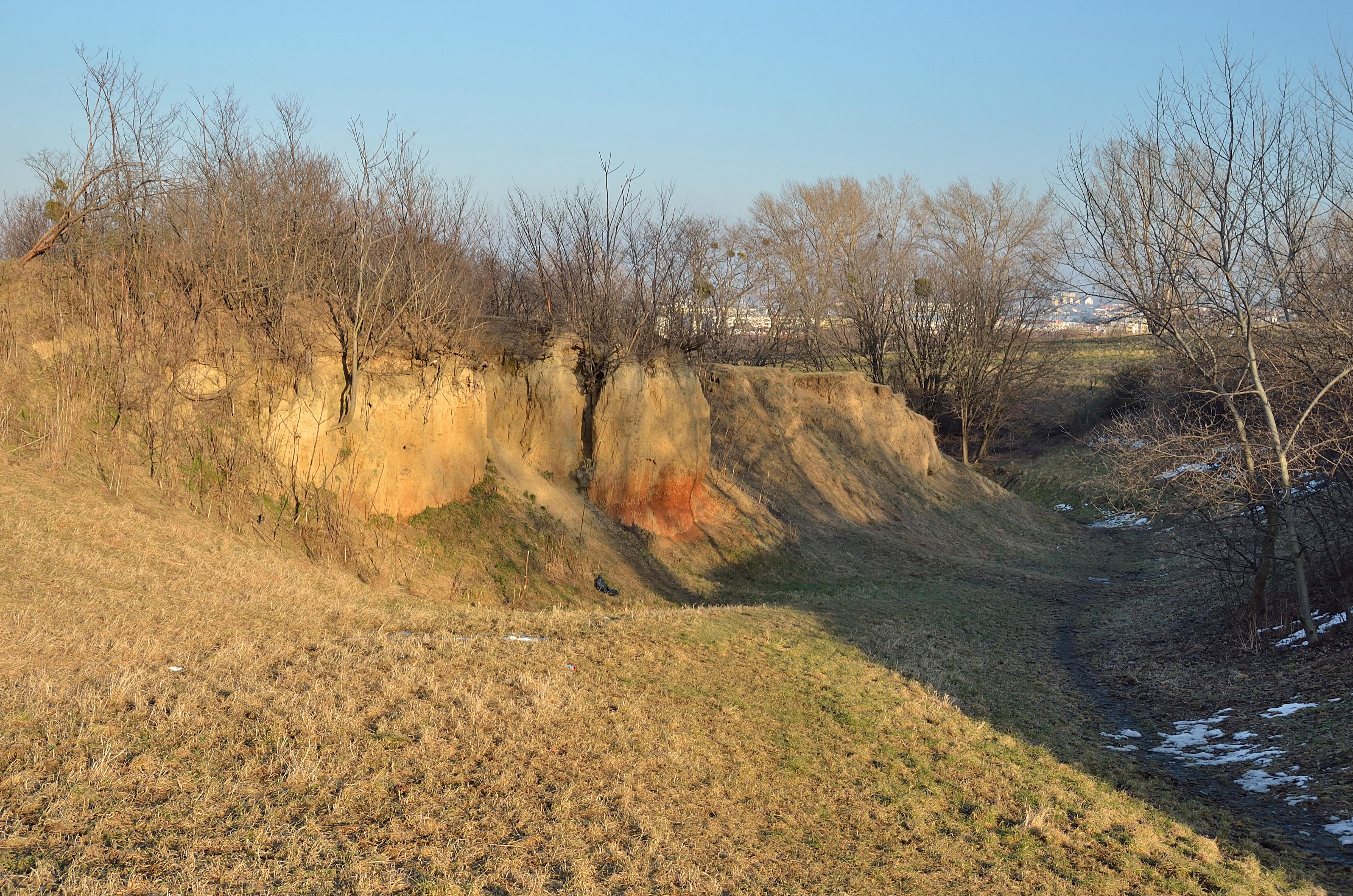 Abbauwand der ehemaligen Rudolfziegelöfen, Löwygrube, Laaer Berg. This media shows the natural monument in Vienna with the ID 704.